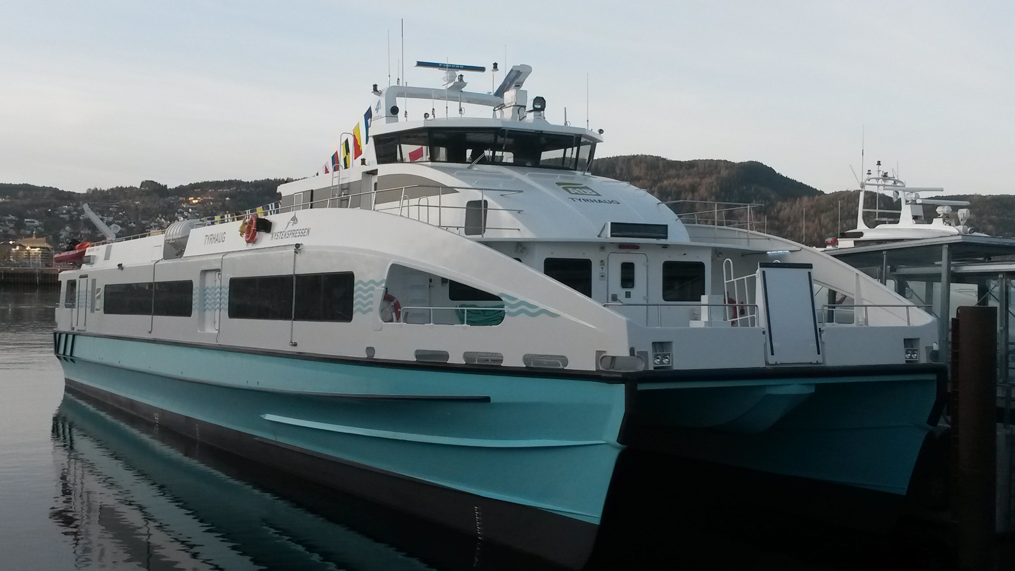 MS Tyrhaug ankommet TRD rette etter overlevering fra Brødrene AA november 2014.